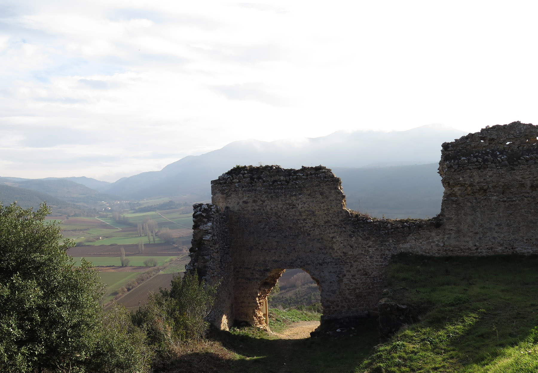 Acceso al Castillo de Lanos, en el pueblo de Ocio, provincia de Álava (España), con vista del valle del río Inglares